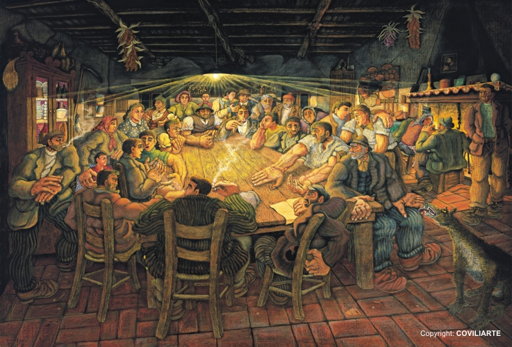 DISCUSSIONE PER LA FORMAZIONE DELLA COOPERATIVA, 1975 tecnica mista su tela cm 170 x 250